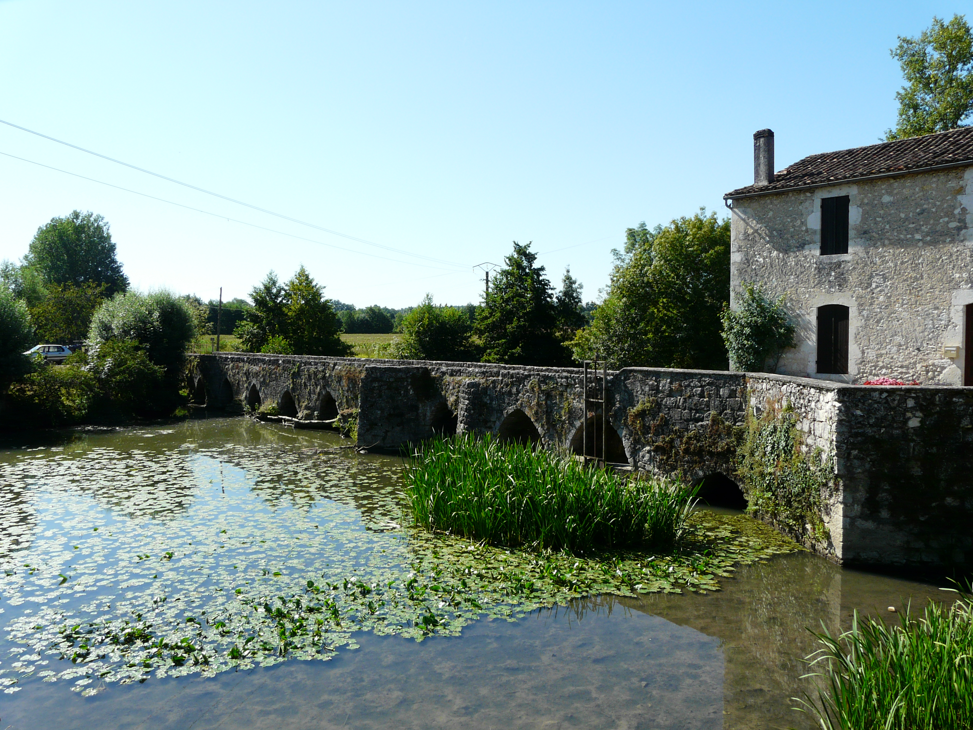 Le vieux pont sur le Dropt partagé entre les communes d'Agnac (à gauche) et de La Sauvetat-du-Dropt (à droite), Lot-et-Garonne, France.